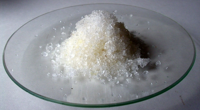 Cd(NO3)2